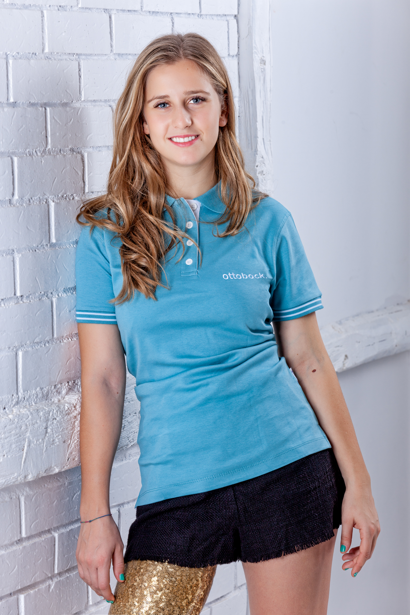 La atleta paralímpica española Desirée Vila.